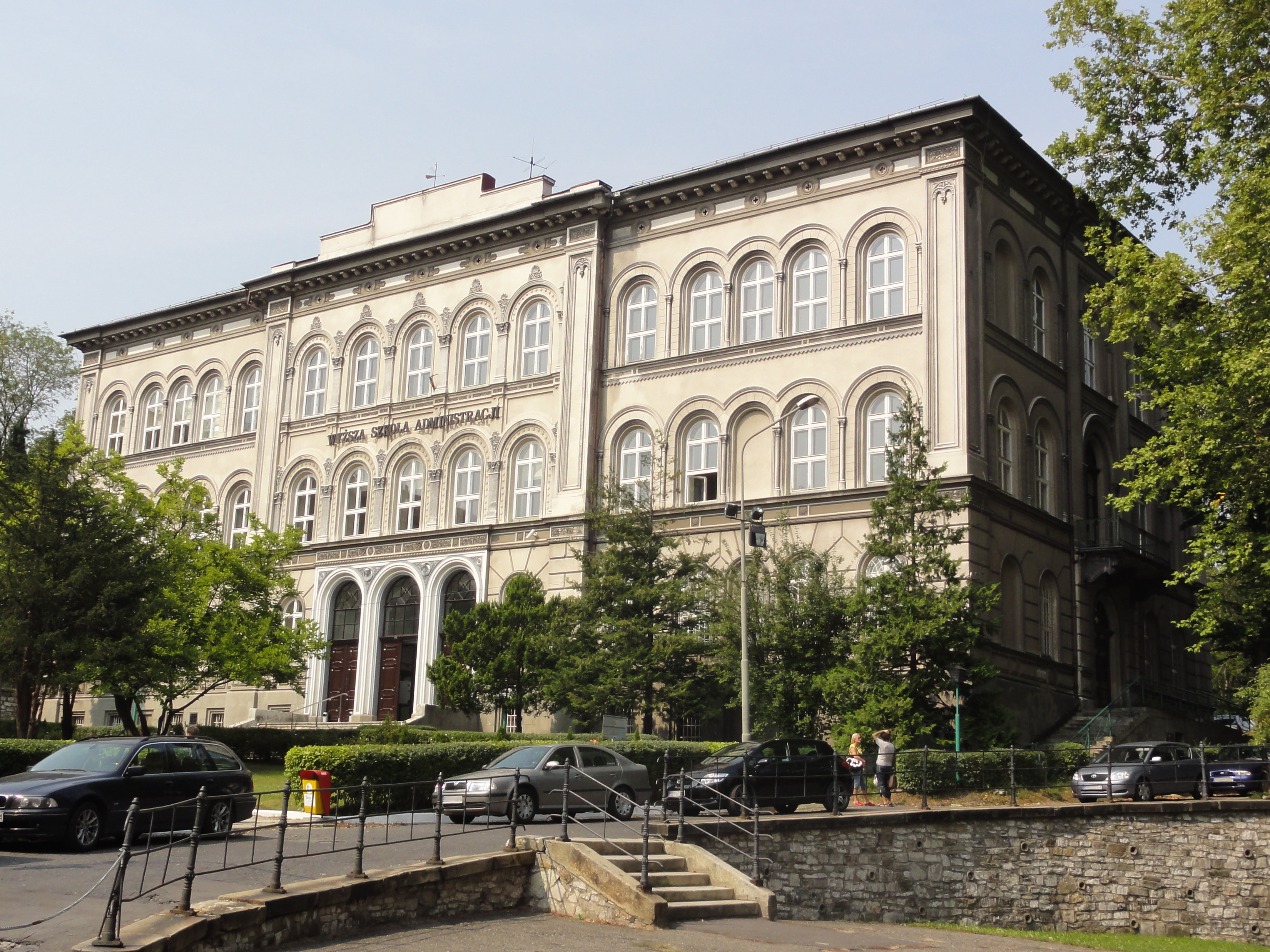 Bielsko-Biała Wyższa Szkoła Administracji